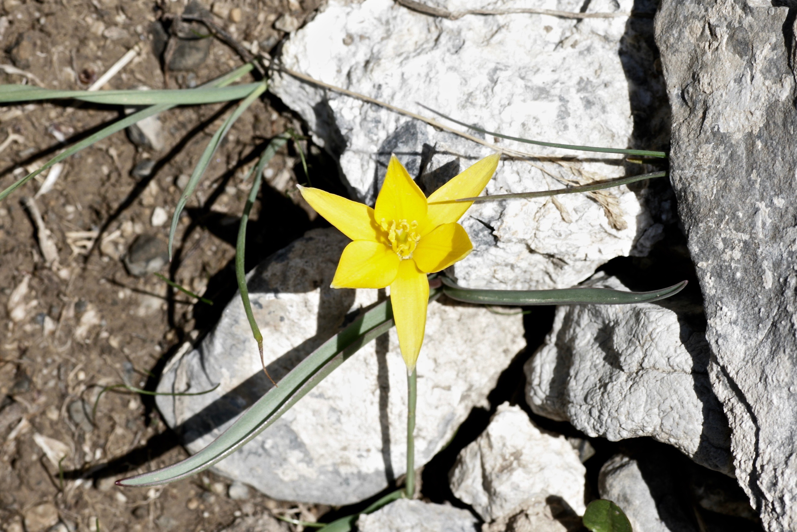 Kyrgyzstan, Alay mts, Suu-Bashi, close to Allauddin river, 3200 m. Rus: Кыргызстан, Баткенская обл., Кадамжайский р-н, 25 км на ЮВ от г. Айдаркен, Алайский хр., урочище Суу-Баши, долина р. Аллауддин, альпийский луг близ снежника, 3200 м н.у.м. 30 июня 2009 г.